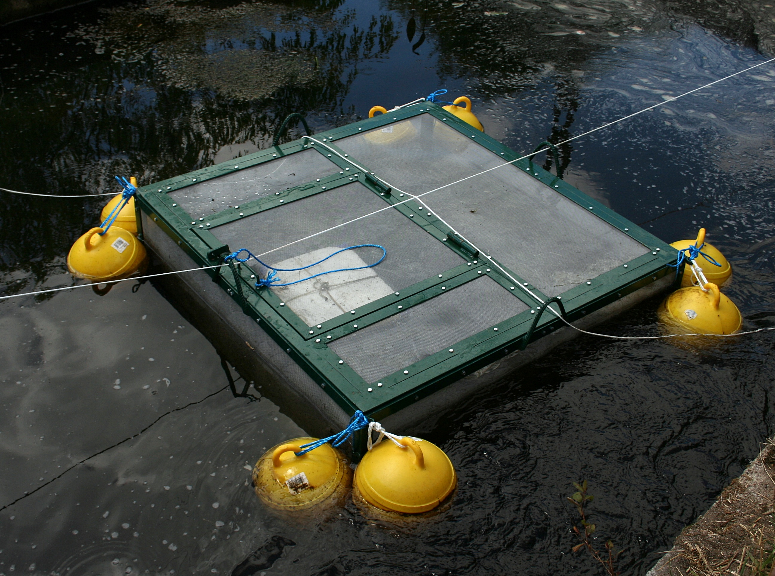 Zaborski Park Krajobrazowy, zbiornik służący do reintrodukcji raka szlachetnego w pobliżu lesnictwa Laska